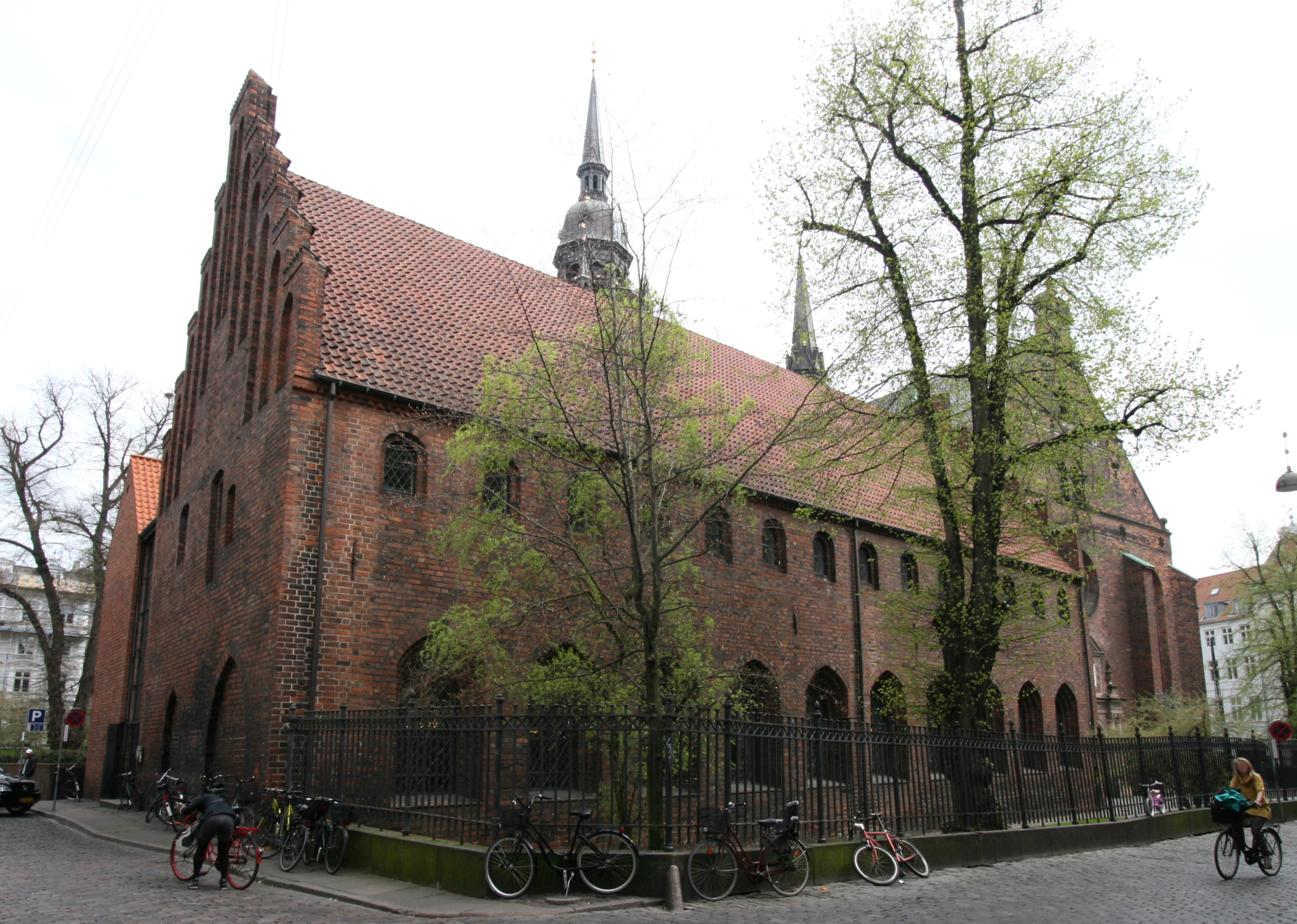 Helligåndskirken, Copenhagen, Denmark. From northwest (Helligåndshuset).